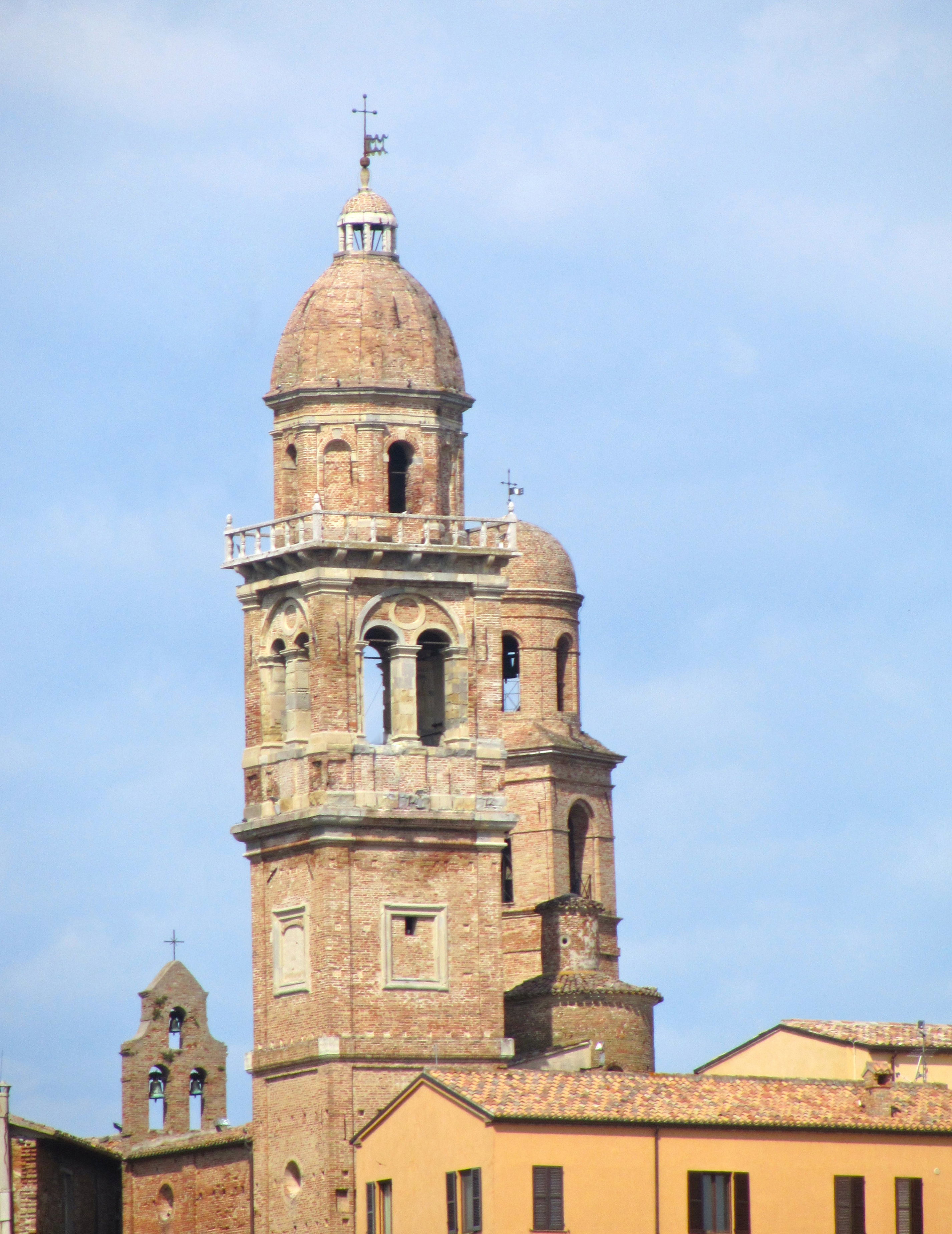 Scorcio della Torre Civica e Campanile ad Orciano di Pesaro